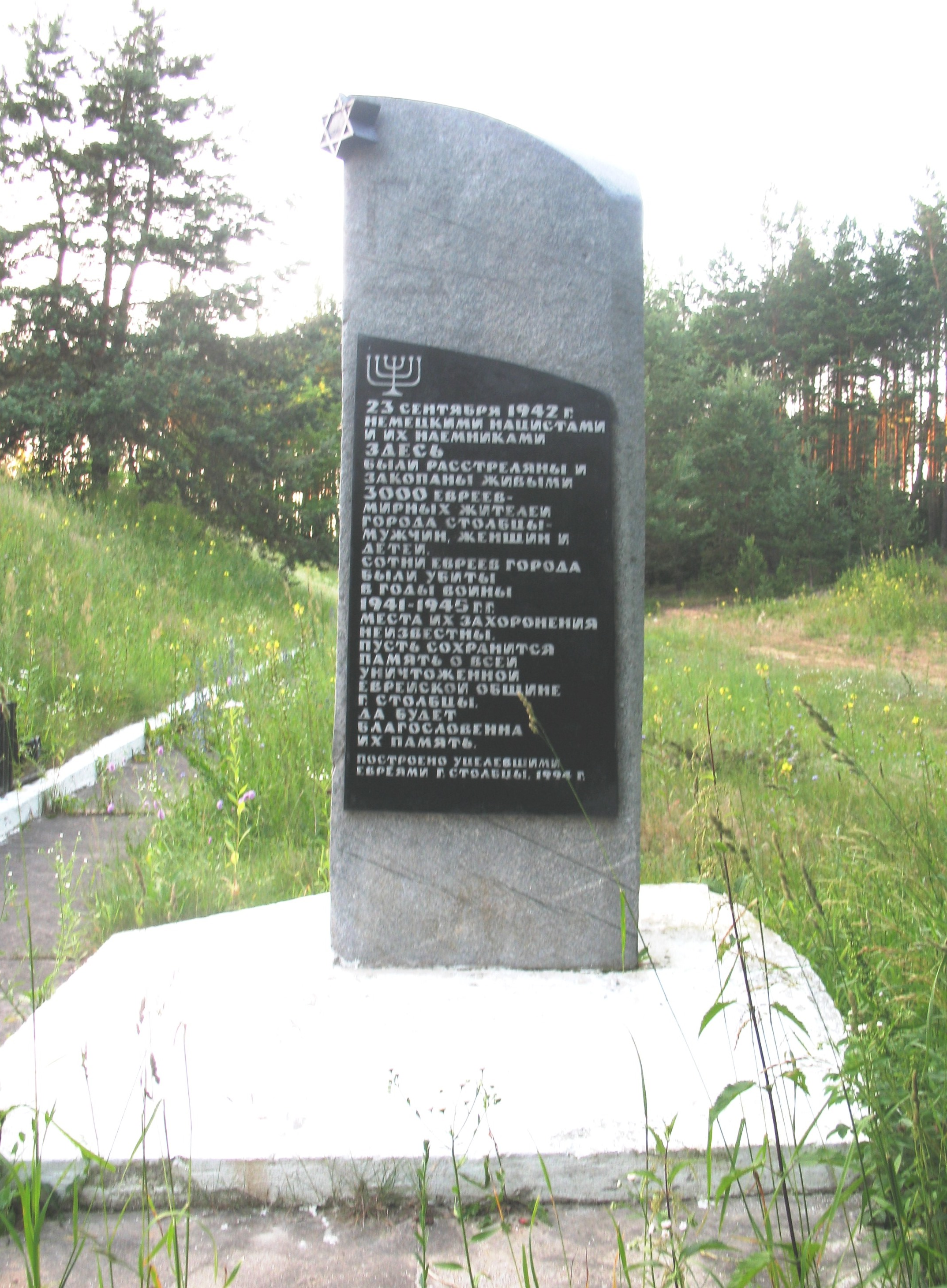 Мемориал на братской могиле евреев города Столбцы Минской области, убитых нацистами во время Холокоста.